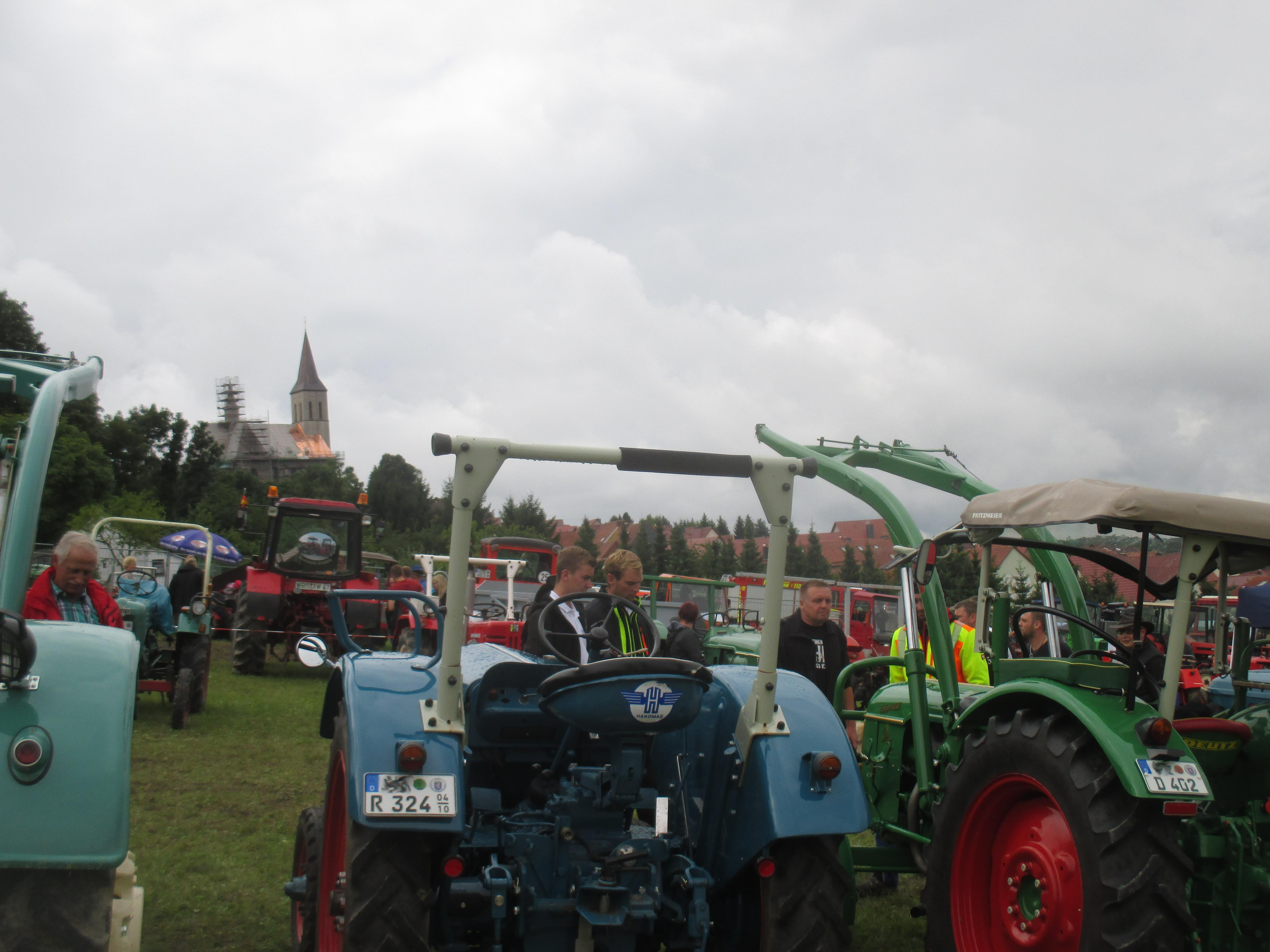 Schleppertreffen in Effelder am 12./13. August 2017.